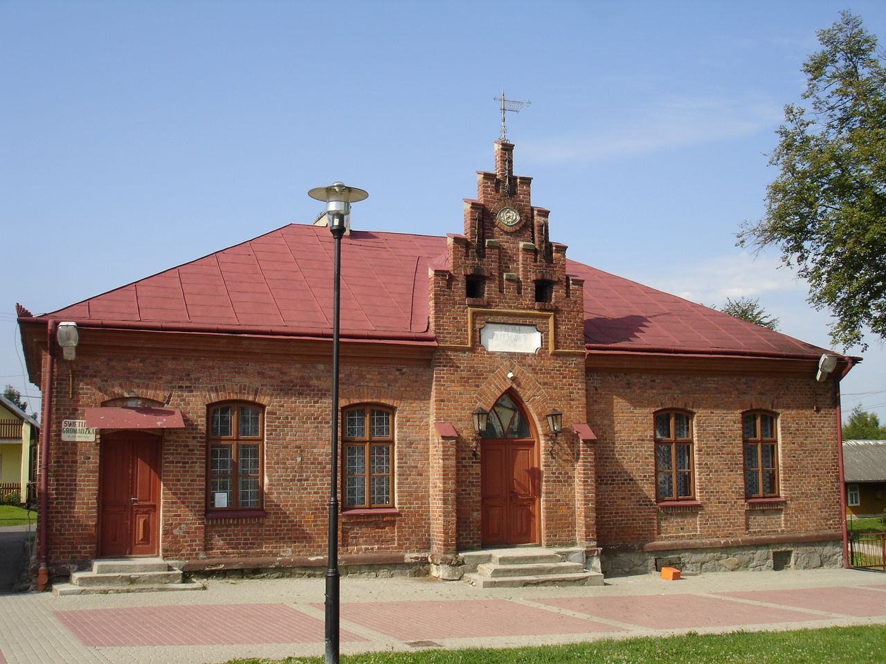 Jaćmierz - old town hall